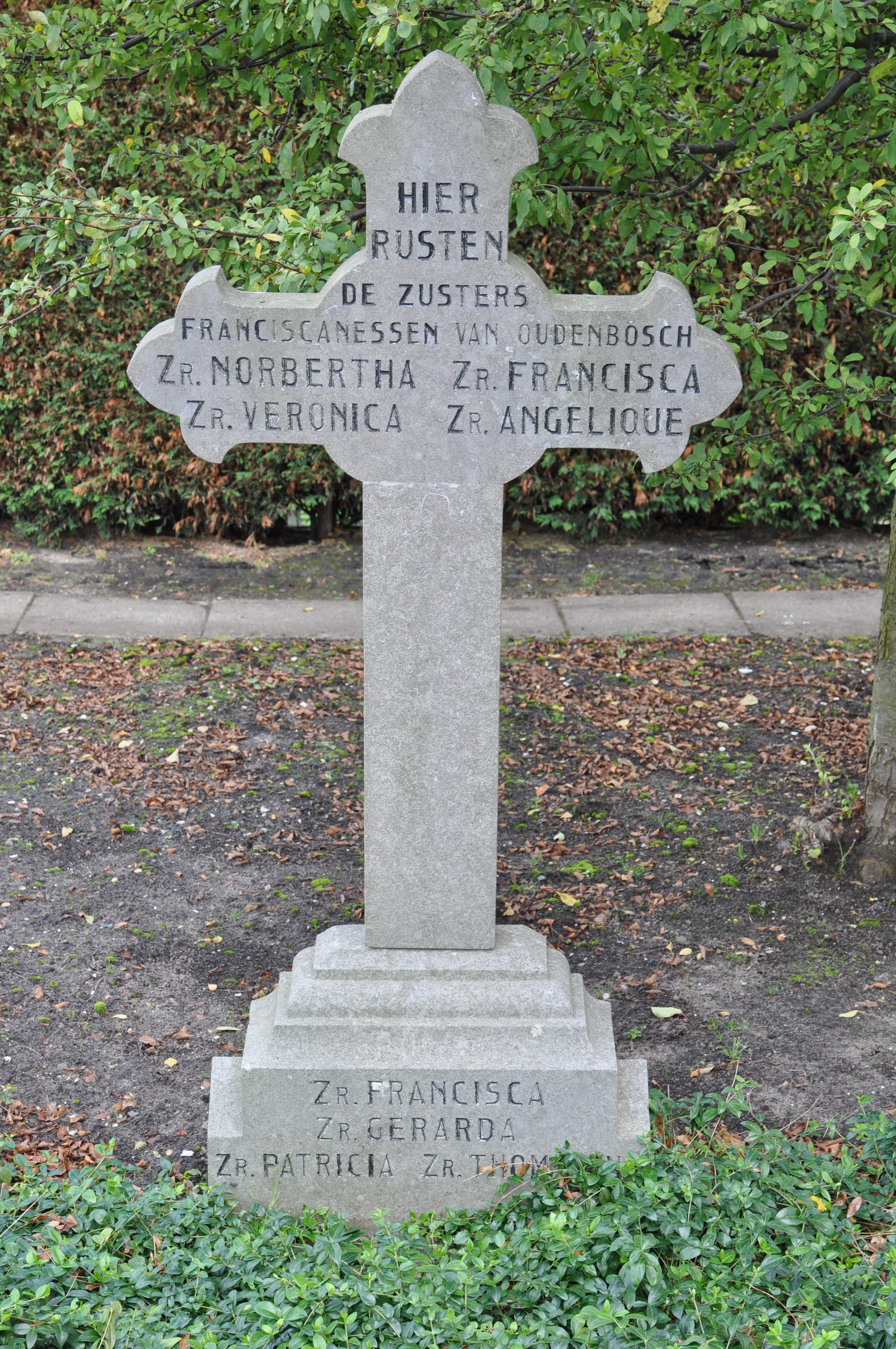 Rooms-Katholieke Begraafplaats Gouda.